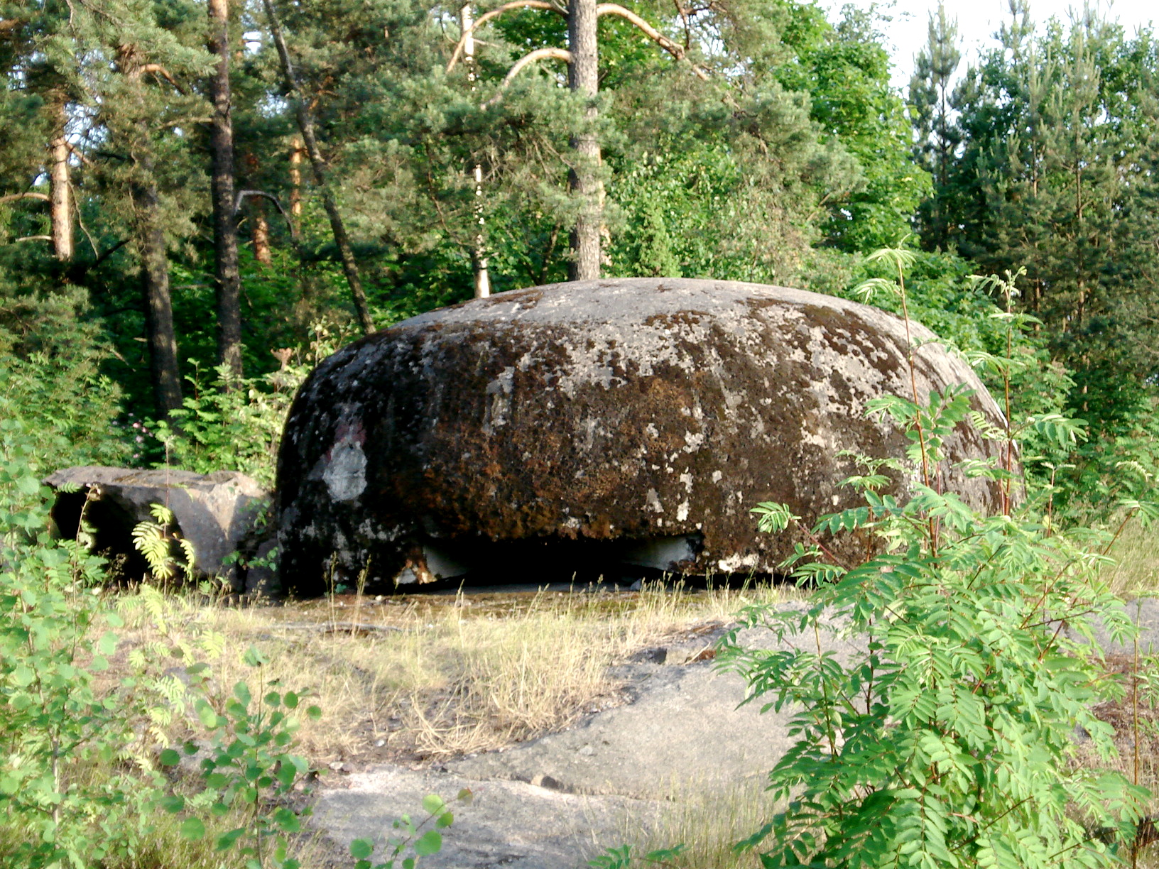 Observation bunker in Helsinki.